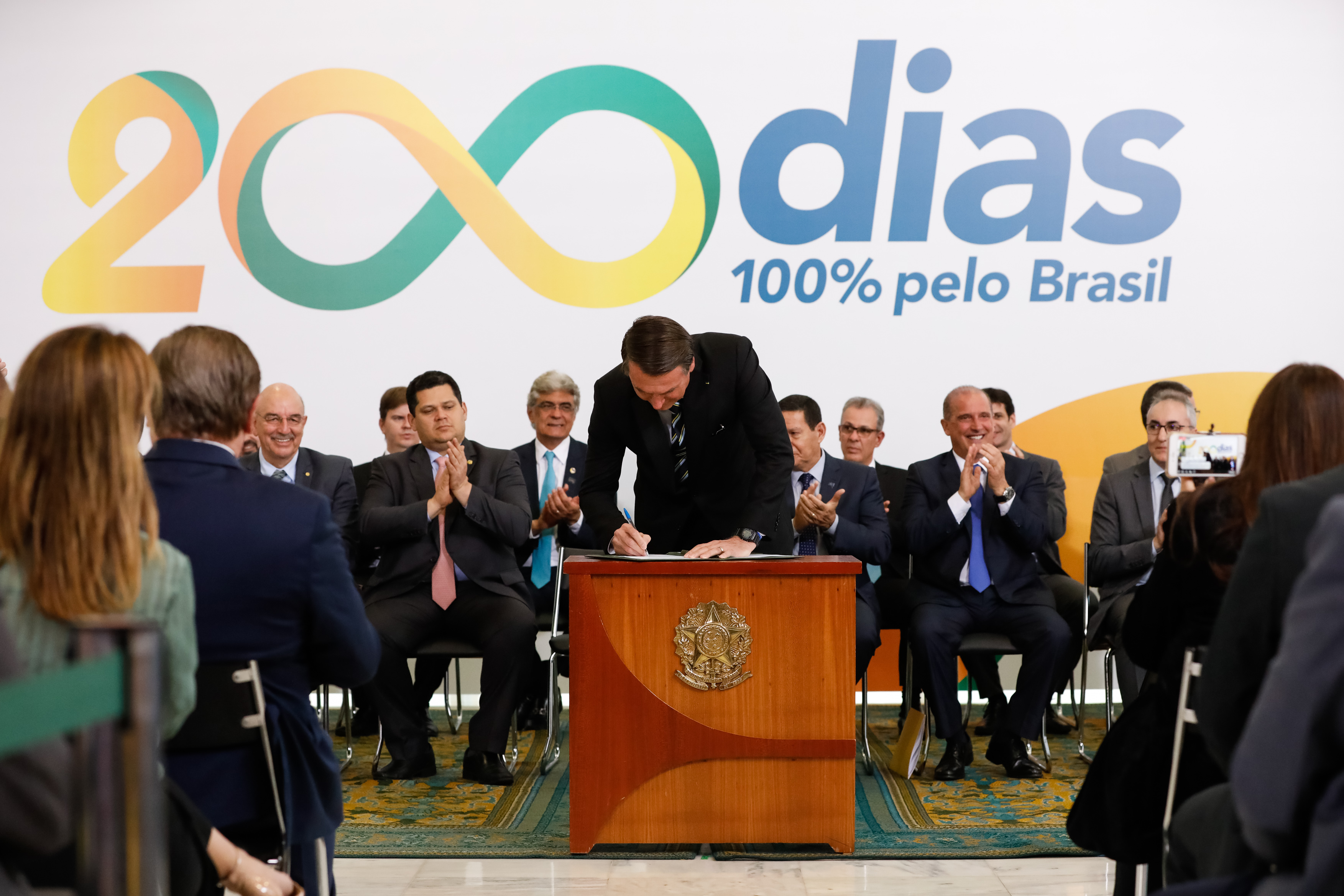 (Brasília - DF, 18/07/2019) Presidente da República, Jair Bolsonaro durante assinatura de Atos Governamentais. Foto: Alan Santos/PR